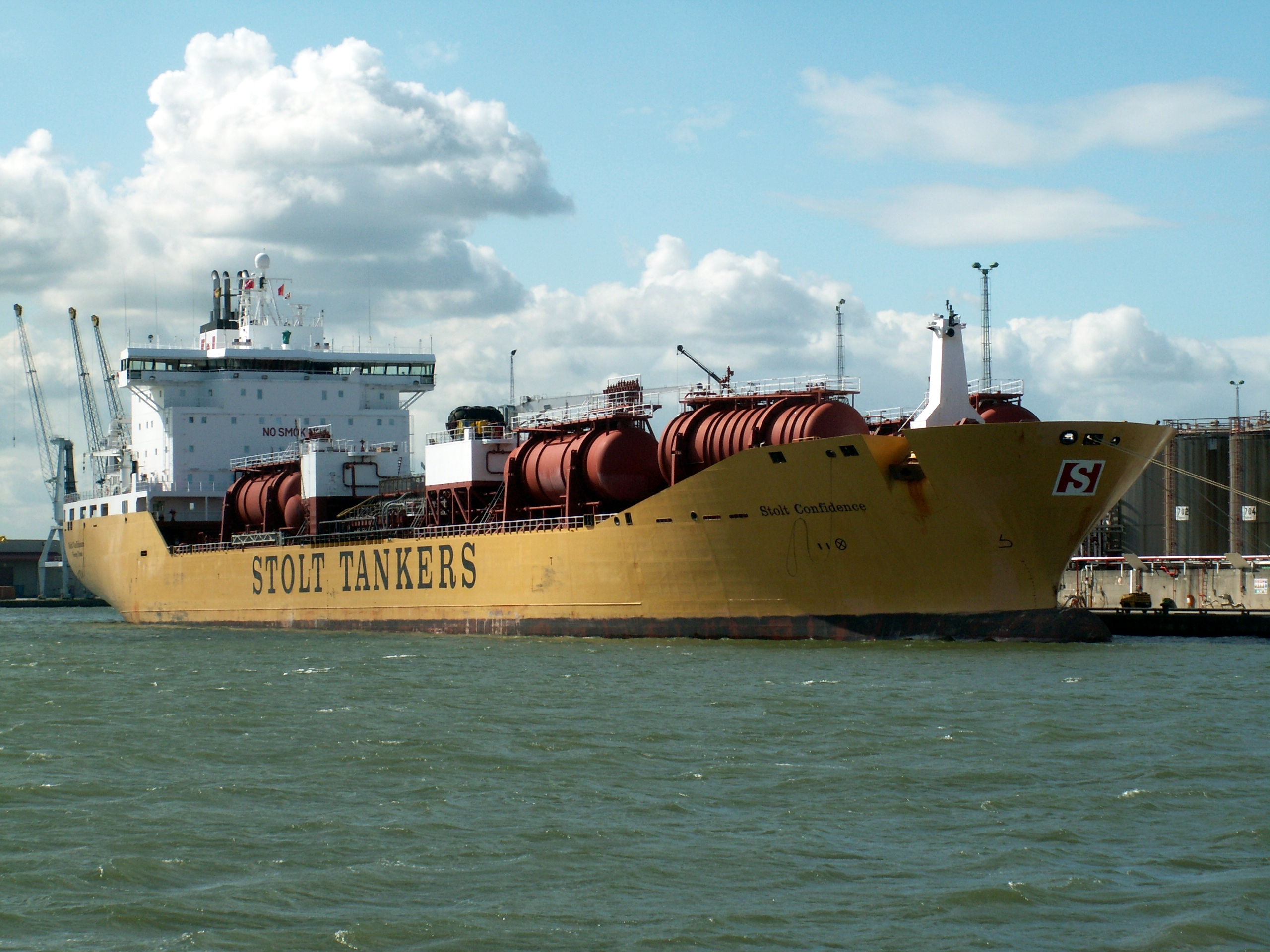 Stolt Confidence IMO 9102071 at Antwerp, Belgium 16-Sep-2005.